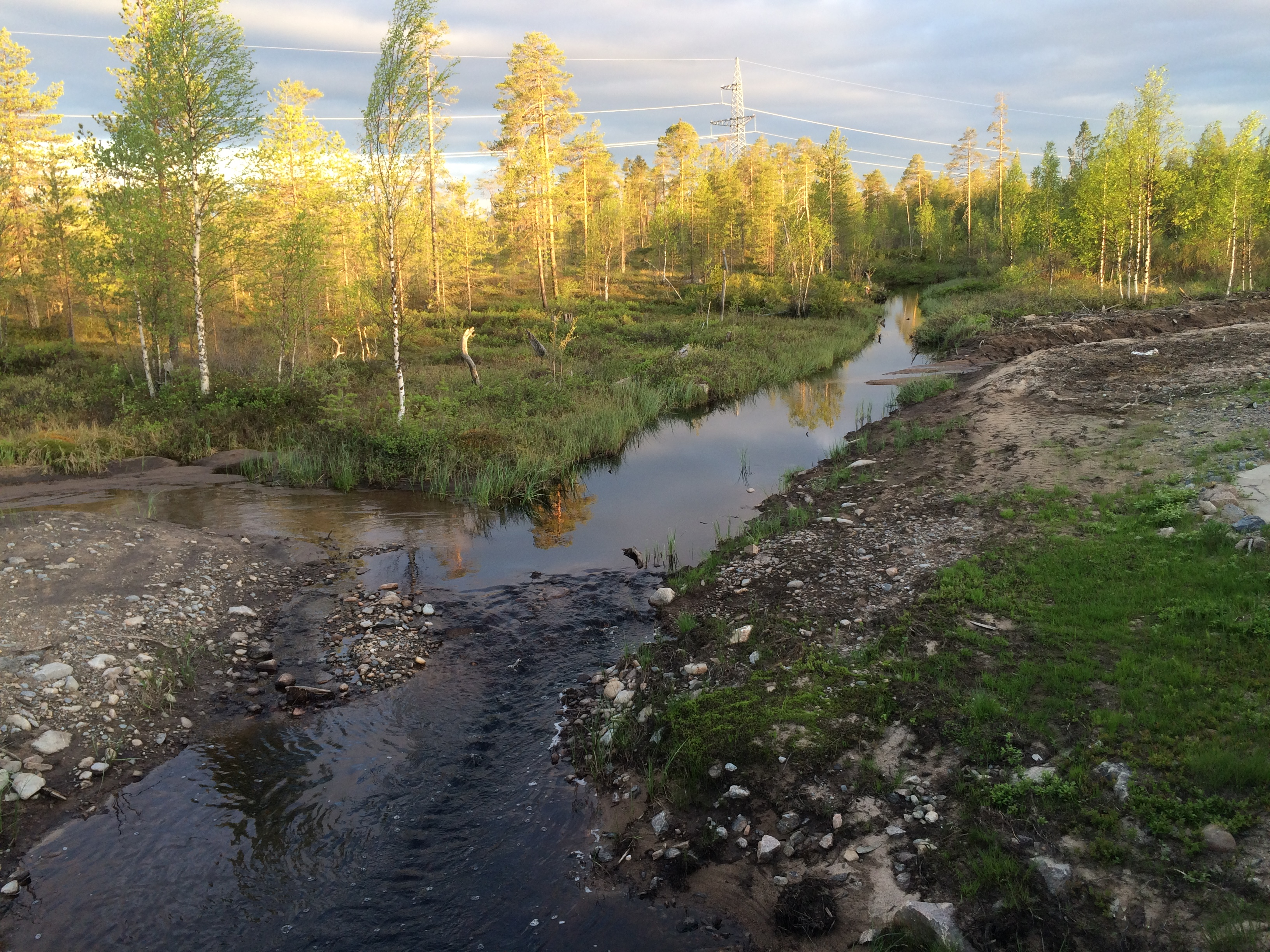 Ретинручей